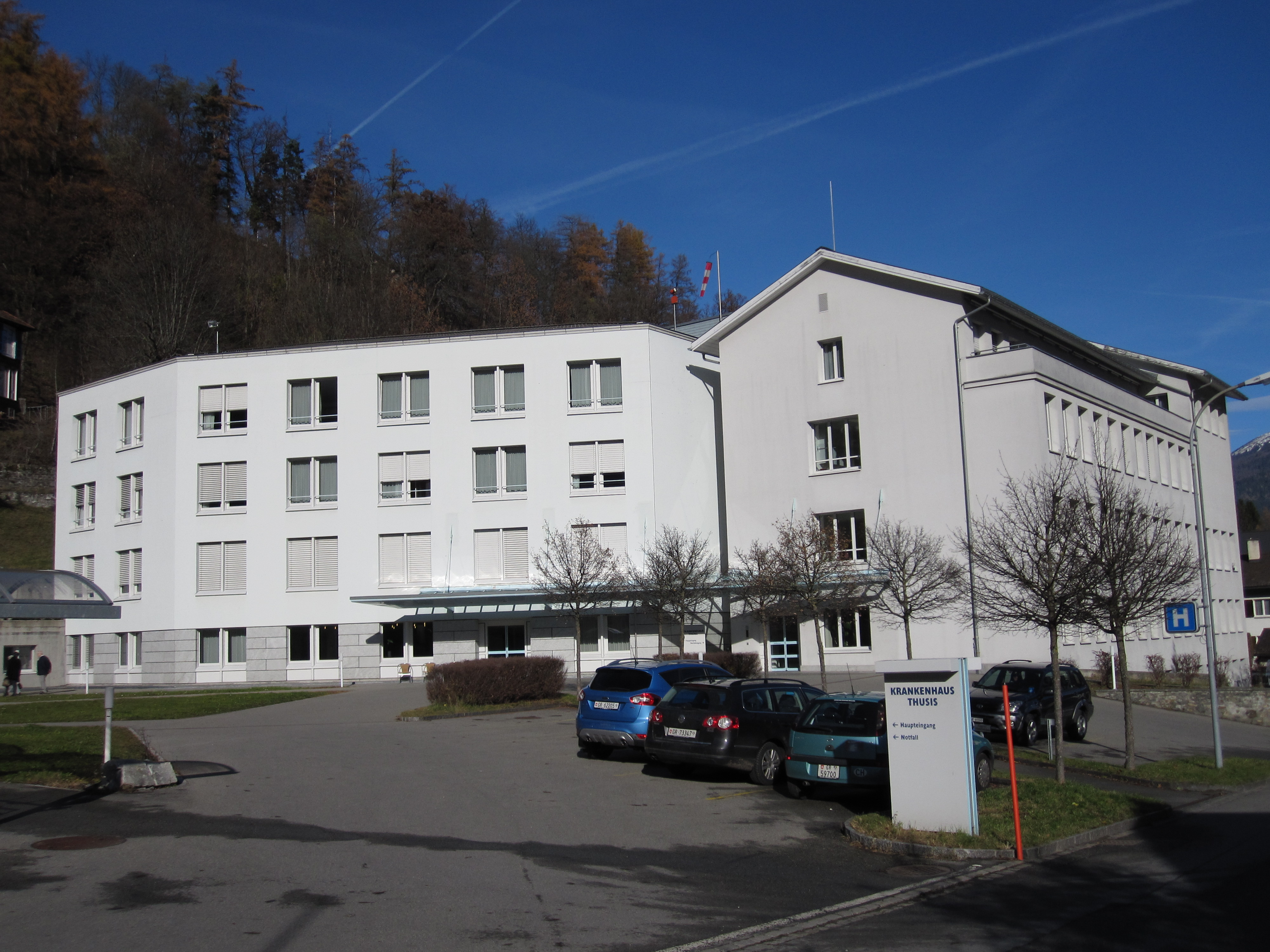 Regionalspital in Thusis (Kanton Graubünden)